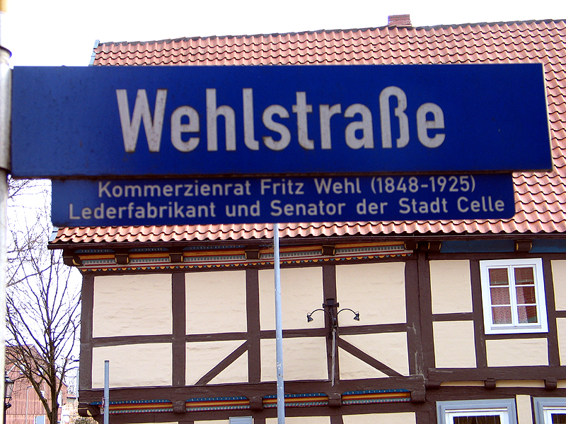 Die Wehlstraße wurde laut der Legende am Straßenschild benannt nach „Kommerzienrat Fritz Wehl (1848-1925), Lederfabrikant und Senator der Stadt Celle“ ...